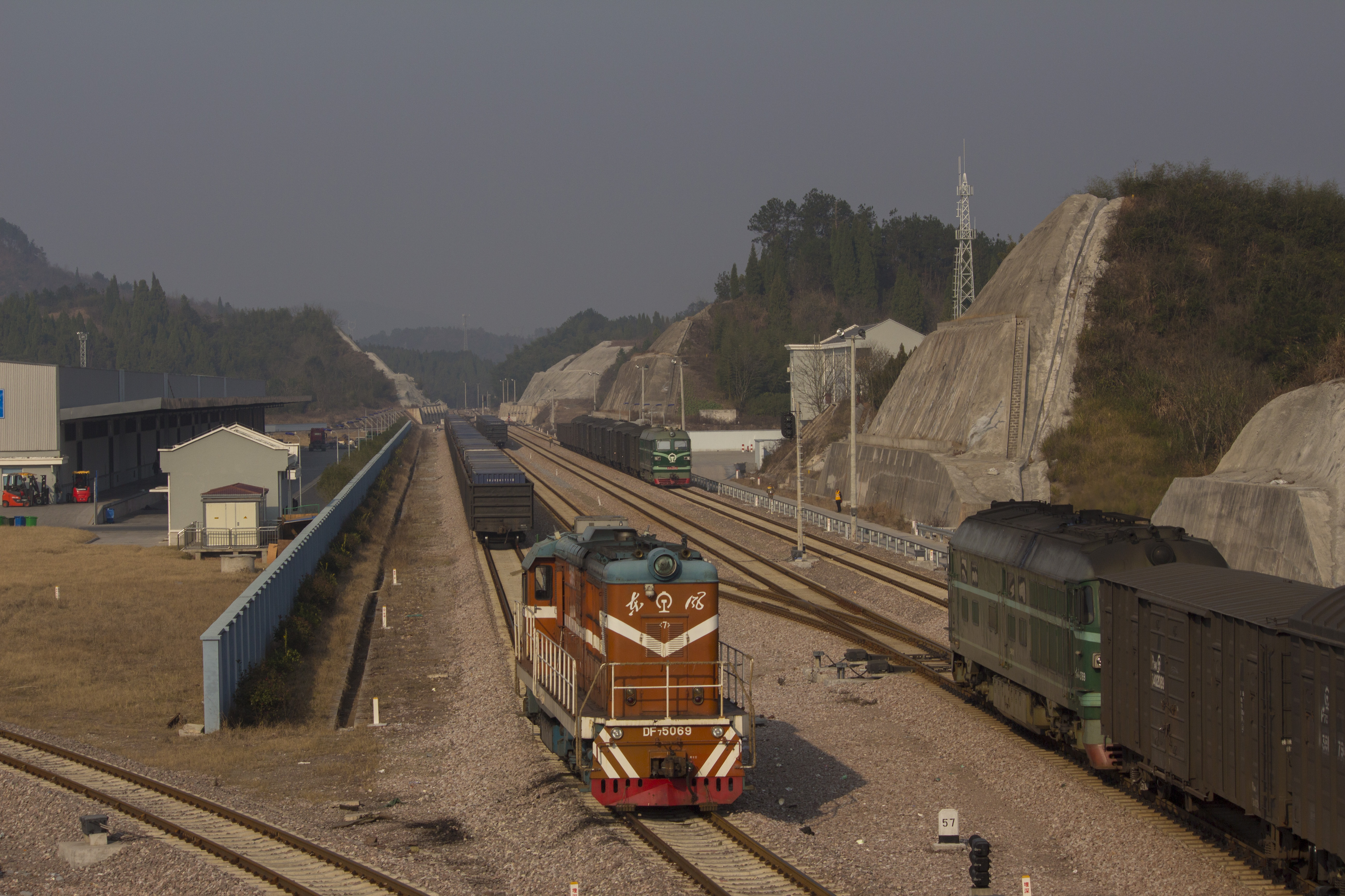 中文（中国大陆）: 新安江南站站场